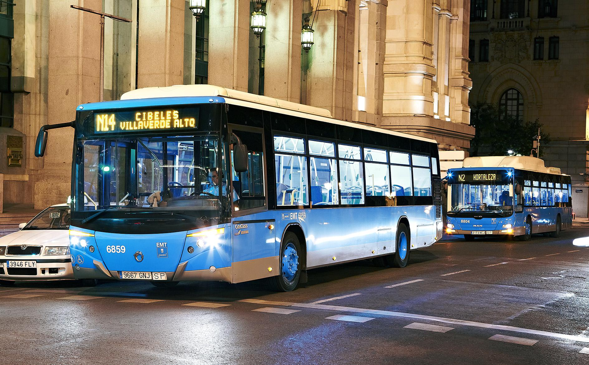 La Empresa Municipal de Transportes de Madrid tendrá que desviar un total de 39 líneas de autobús diurnas desde, aproximadamente, las 15:00 horas del sábado día 7 de julio y hasta primera hora de la mañana del domingo 8 de julio con motivo de la manifestación del Orgullo LGTB 2018. La amplia zona que será escenario de esta celebración comprende el eje Prado-Cibeles-Recoletos, Plaza de Colón, Gran Vía y Plaza de España.